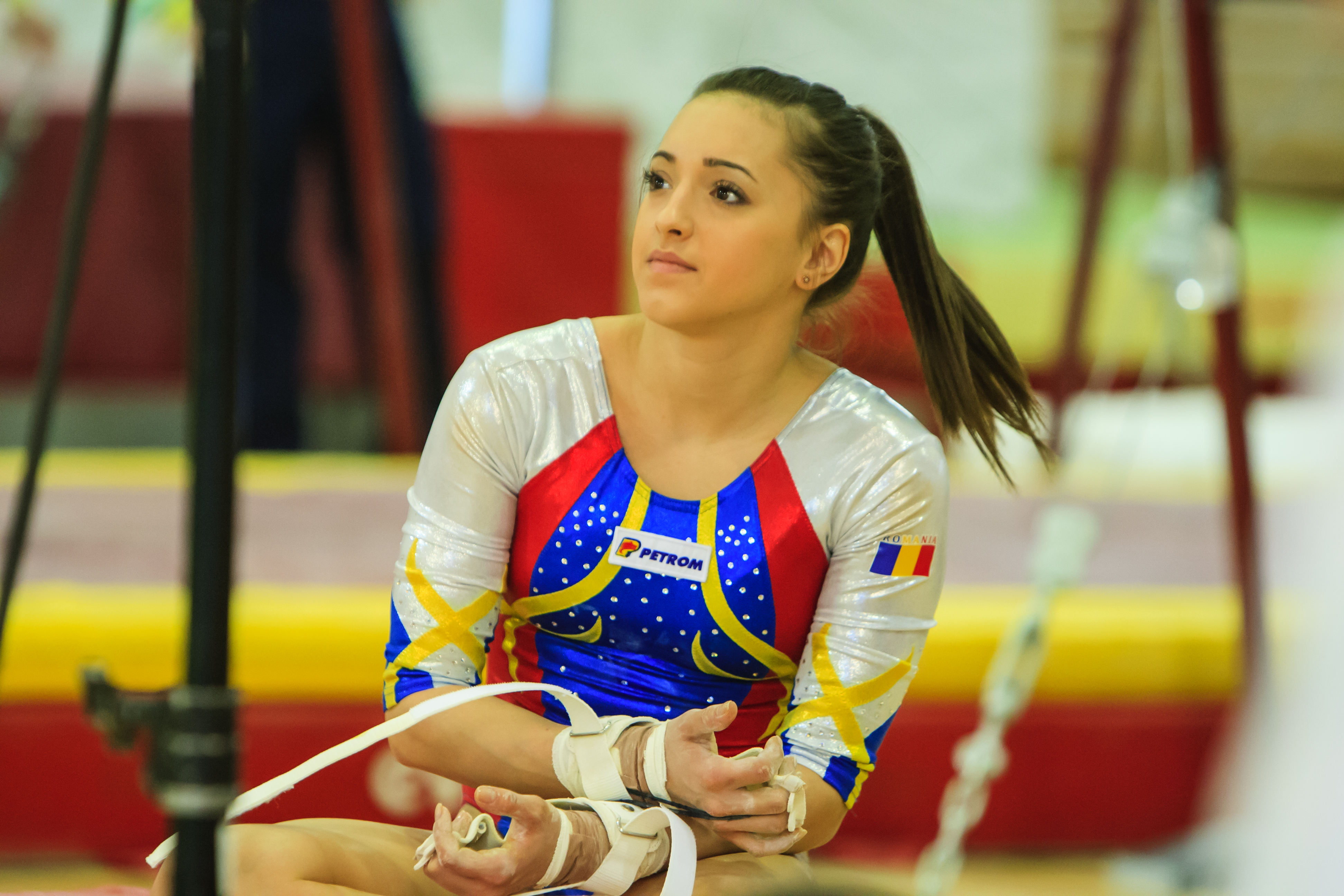 Larisa Iordache